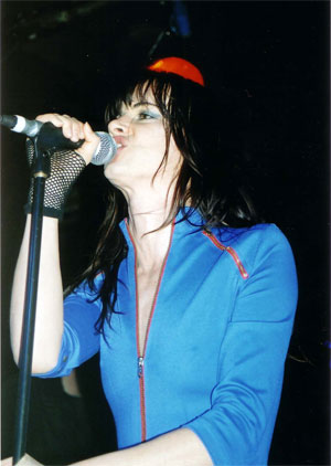 Juliette and the Licks performance at The Barfly in 2005